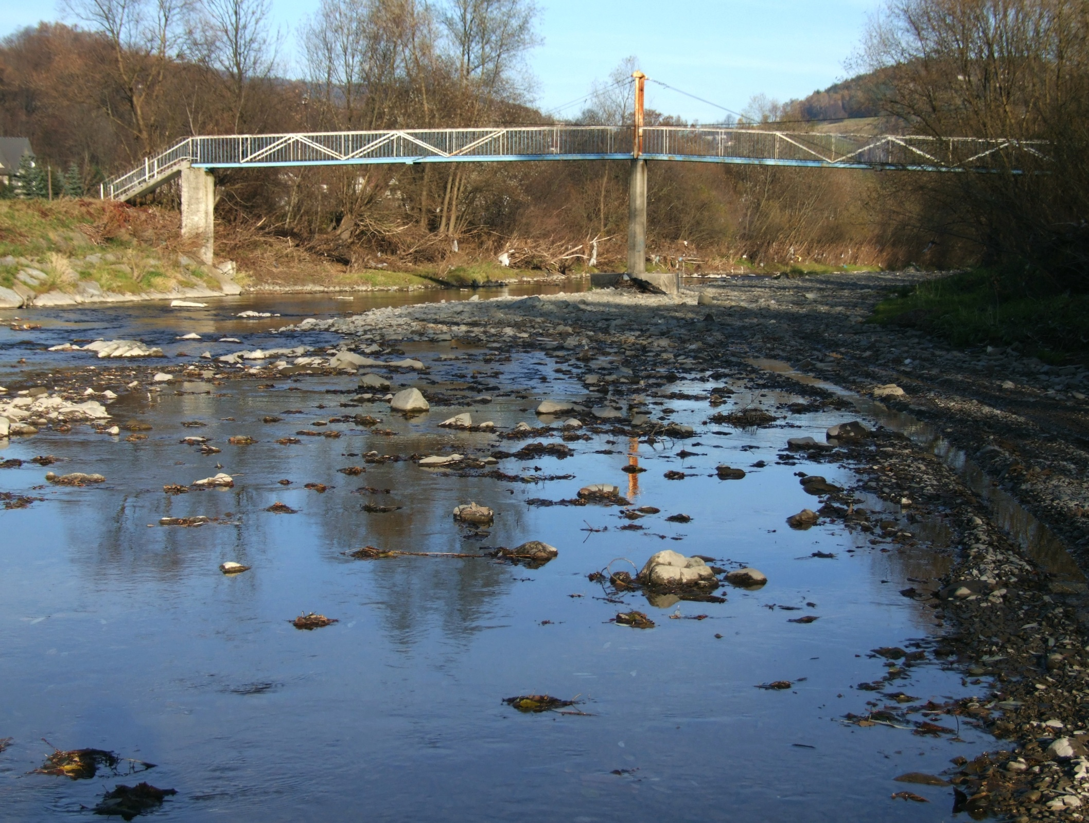 Łososina w Piekiełku (przy niskim stanie wody)